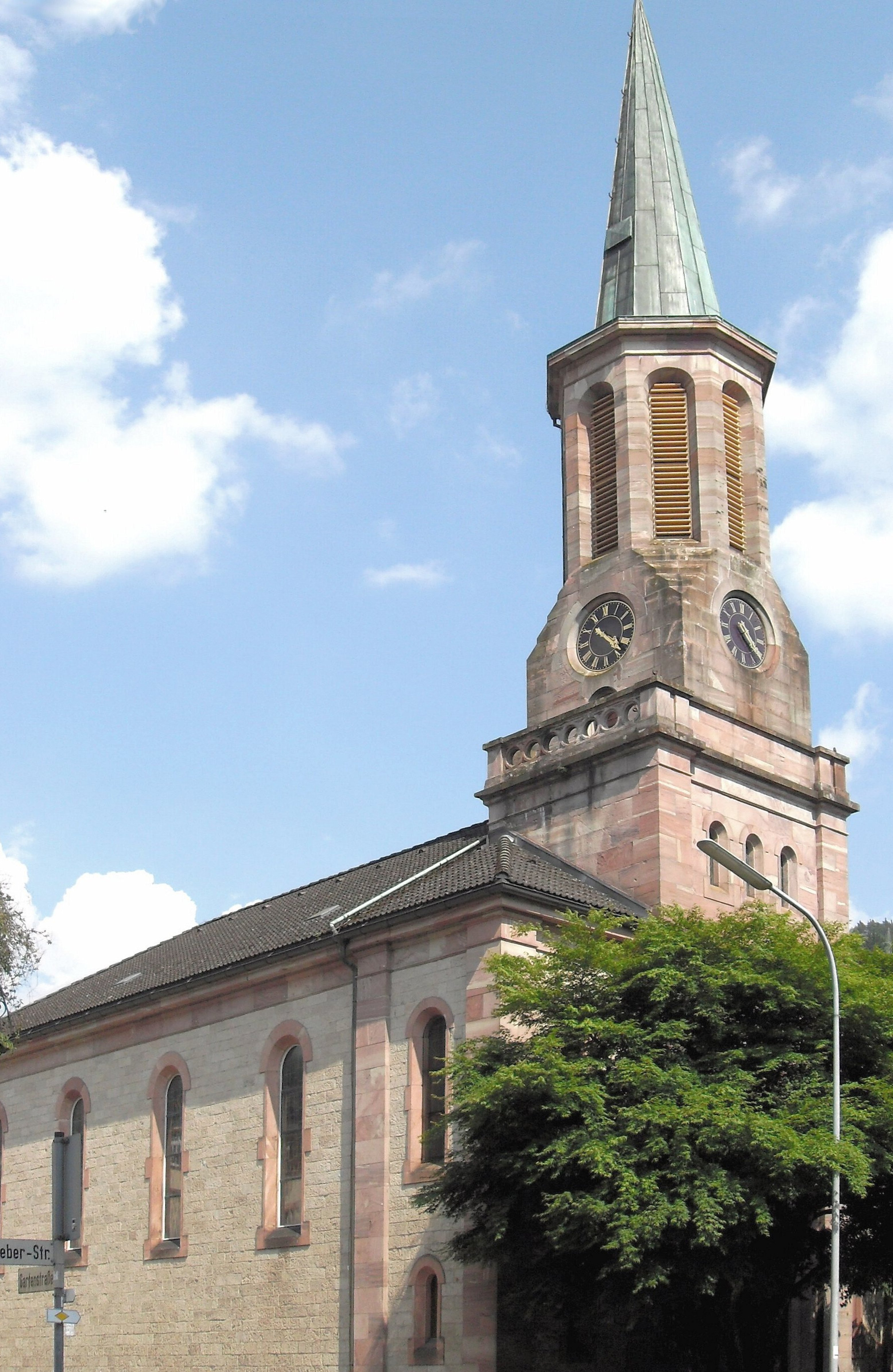 evangelische Kirche St. Peter in Zell im Wiesental, Schwarzwald, Deutschland